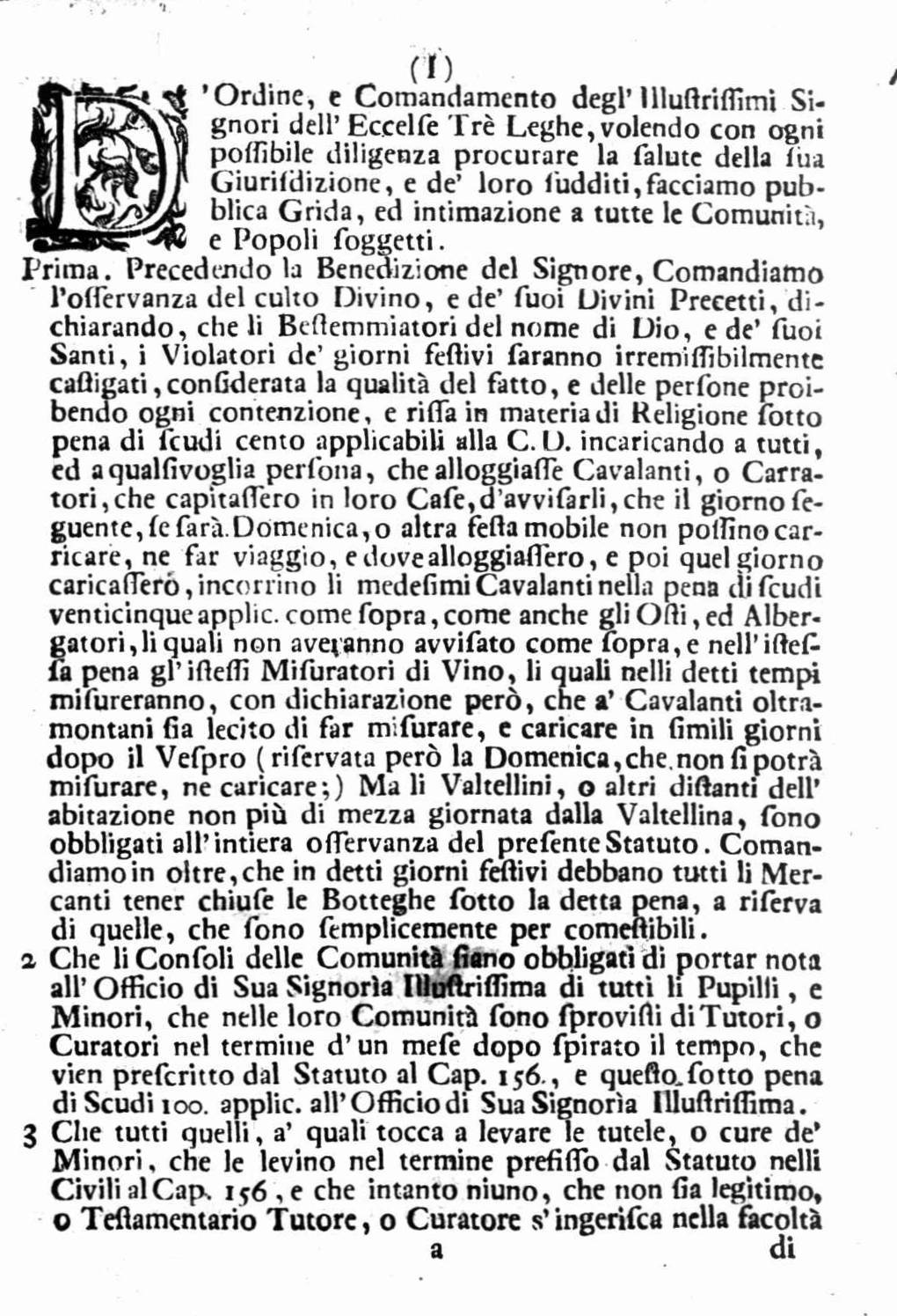 pagina